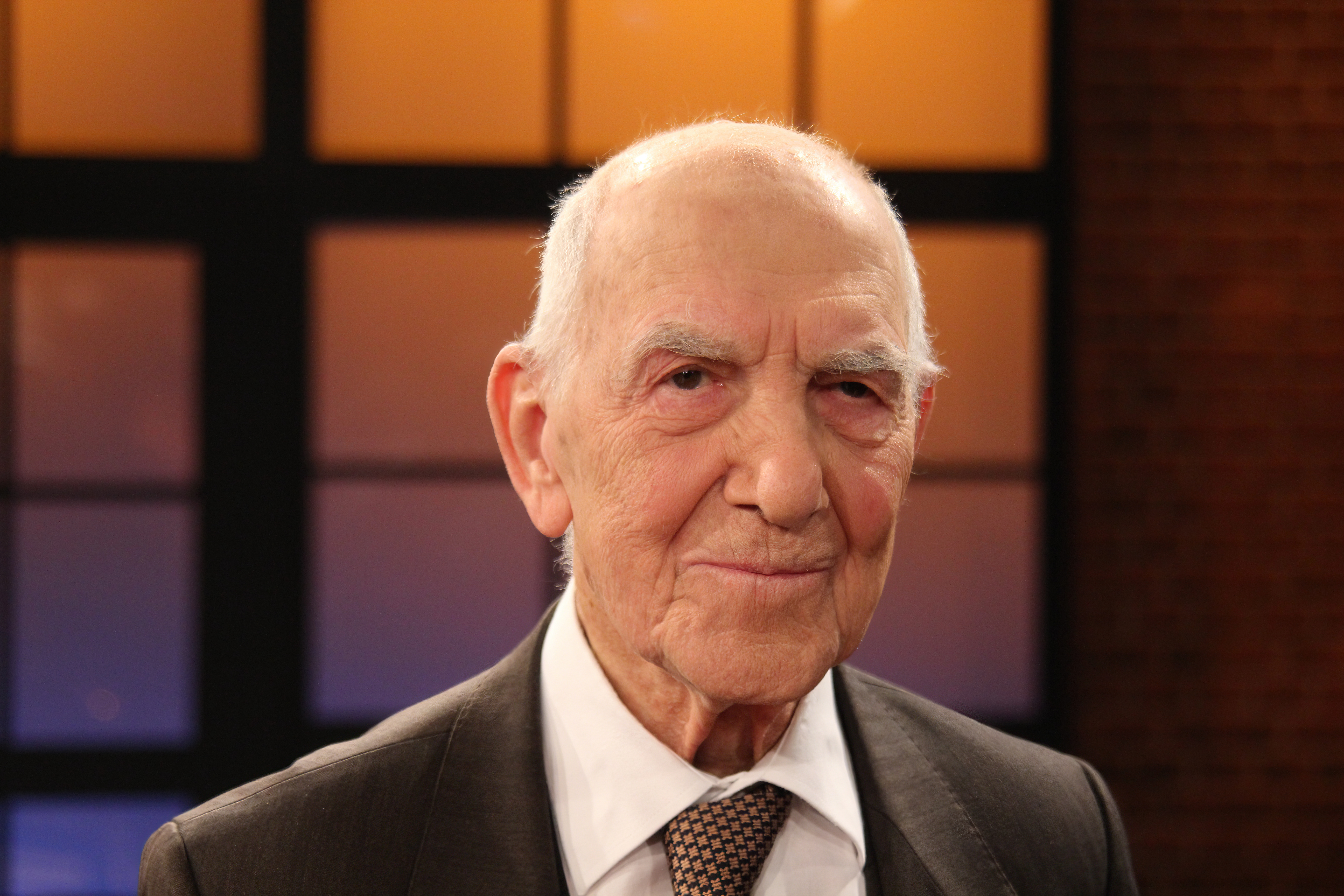 Stéphane Hessel, französischer ehemaliger Résistance-Kämpfer, Überlebender des Konzentrationslagers Buchenwald, Diplomat und Lyriker.